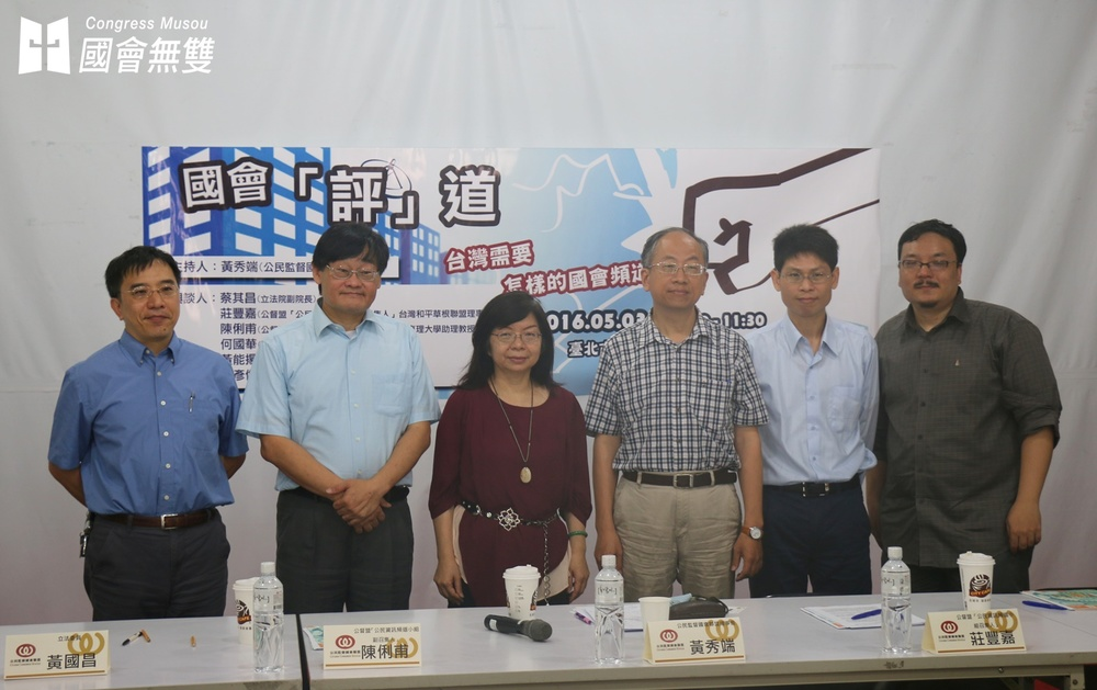 中文（台灣）: 公民監督國會聯盟於臺北市非政府組織會館舉辦「國會『評』道：臺灣需要怎樣的國會頻道」座談會，公民監督國會聯盟理事長黃秀端（左三）主持，邀集學者專家、立法委員，就國會頻道試播狀況、改善方向提出建議。